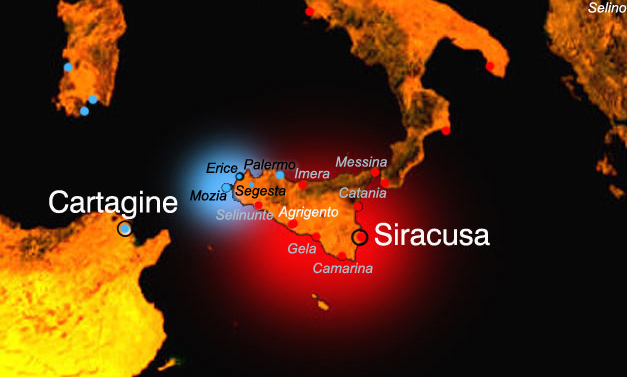 Principali colonie greche (in rosso) e punico/fenicie (o filo puniche, in blu) della Sicilia